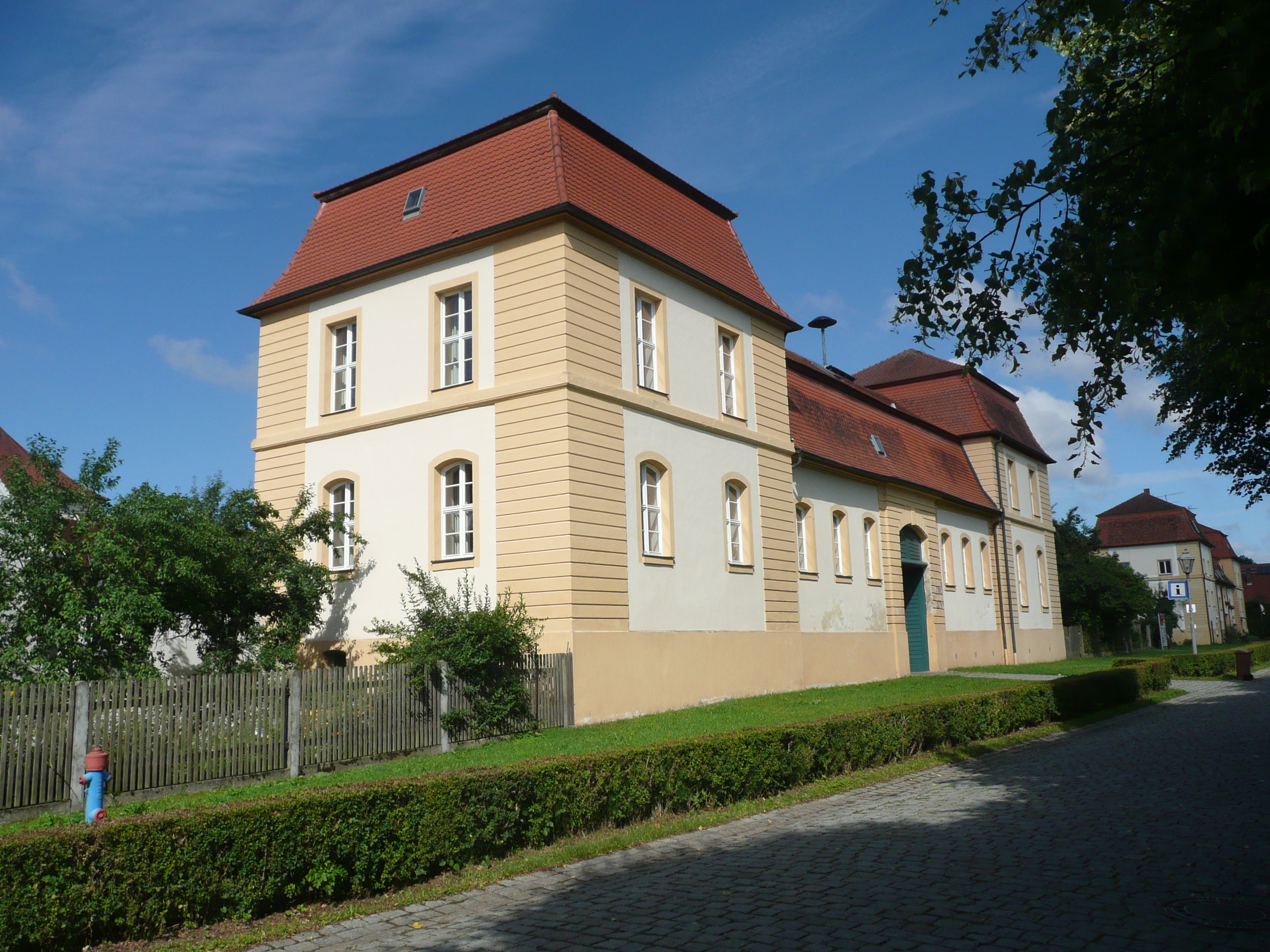 Schlossgebäude